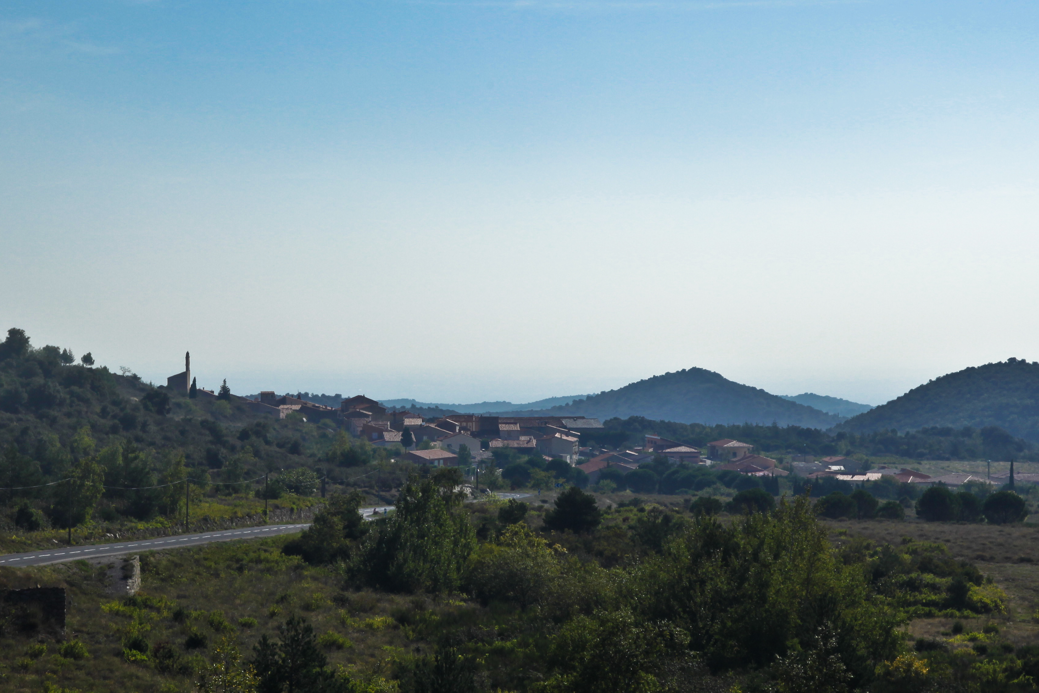 Village de Trévillach